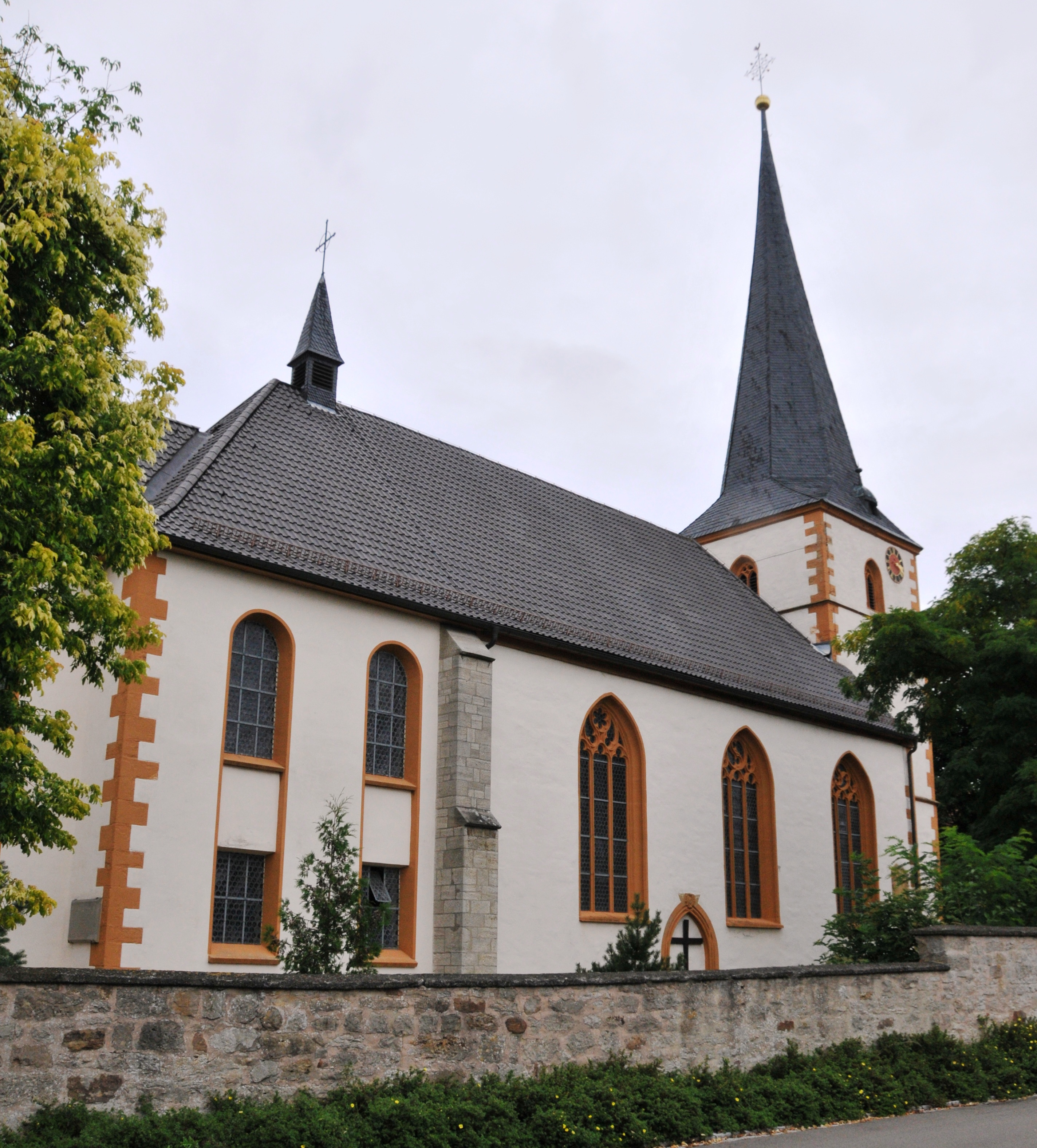 Wolfmannshausen, Kirche, außen